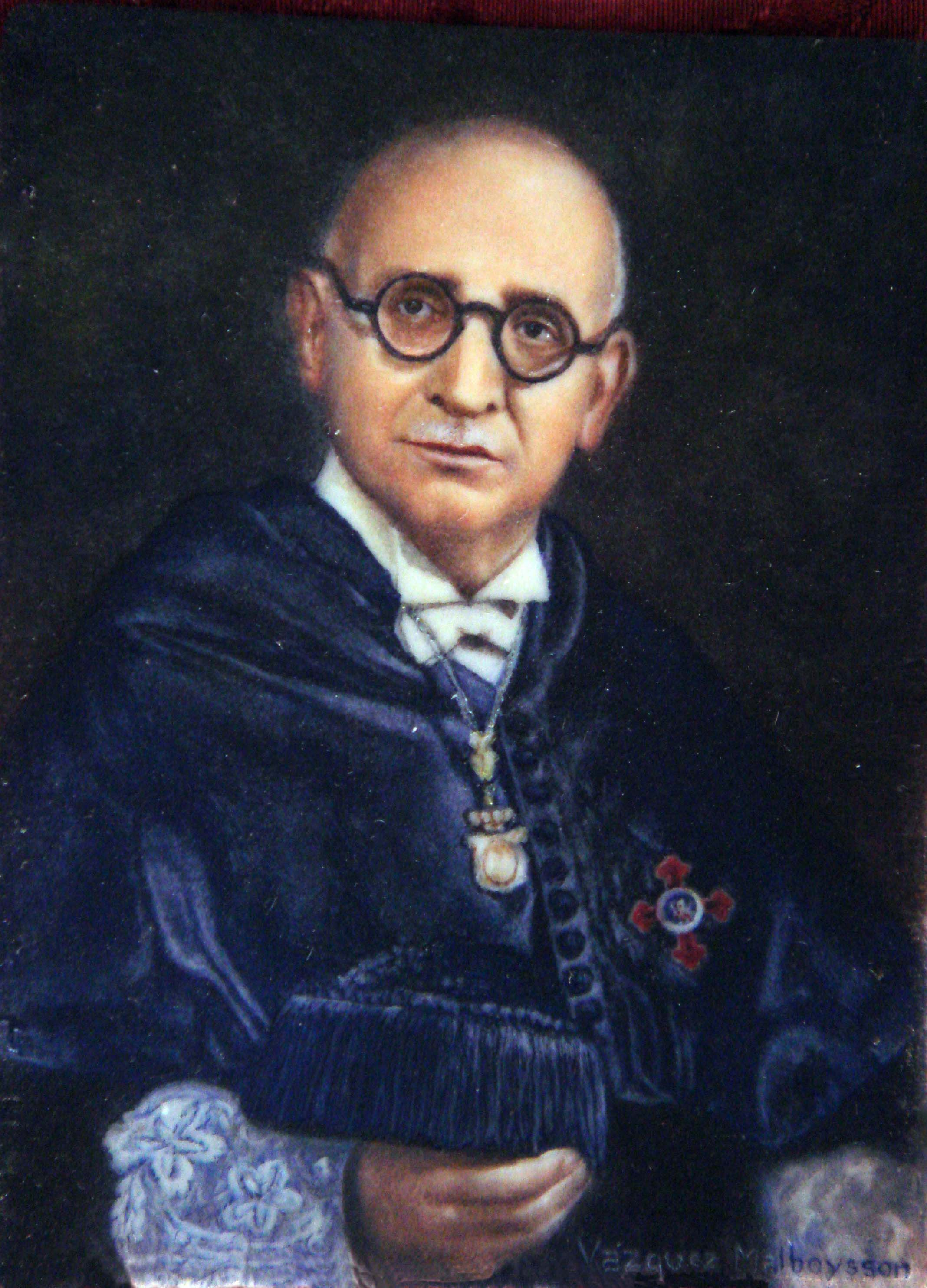 Vicerector de la Universidad de Valencia